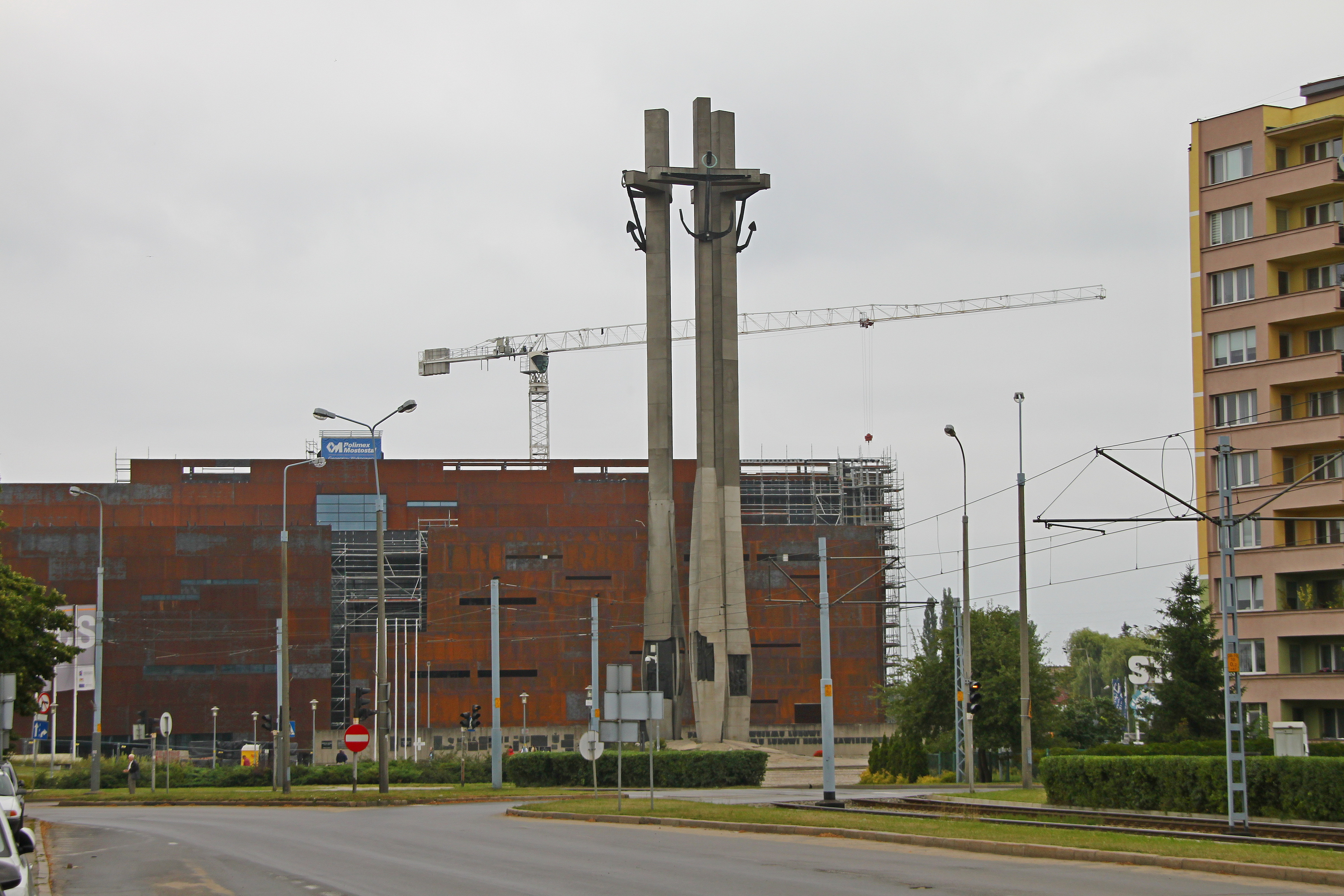 Gdańsk Śródmieście, ul. Wały Piastowskie, Pomnik Poległych Stoczniowców Grudnia 1970 (z 1980) i Europejskie Centrum Solidarności.